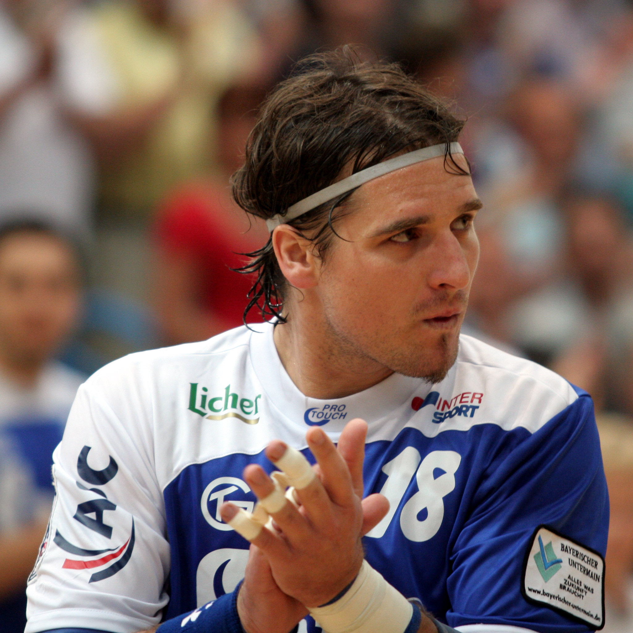 Ulrich Wolf, Handballspieler beim TV Großwallstadt am 14. Mai 2008 nach dem Spiel gegen den VfL Gummersbach in der f.a.n. Frankenstolz Arena in Aschaffenburg. Es war sein Abschiedsspiel (Karriereende)